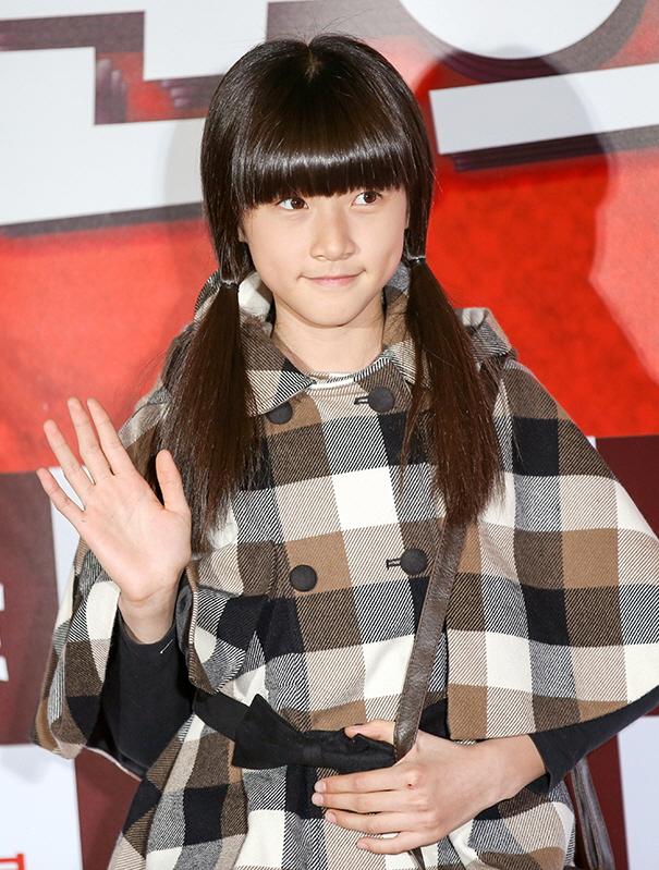 121217 가문의 귀환 시사회 김새론 직찍